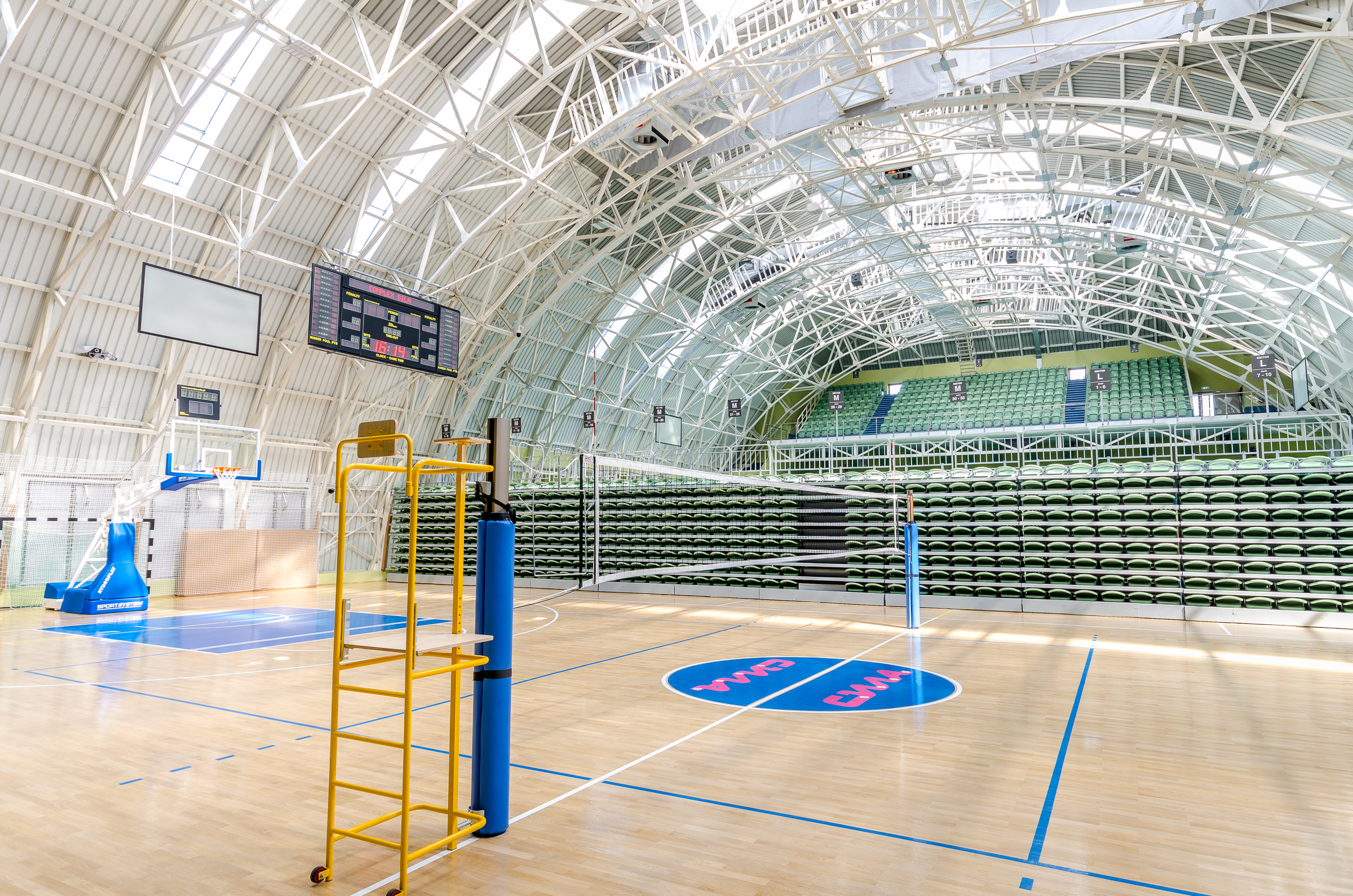 Терен за баскетбол, волейбол и др. в Комплекс С.И.²Л.А.